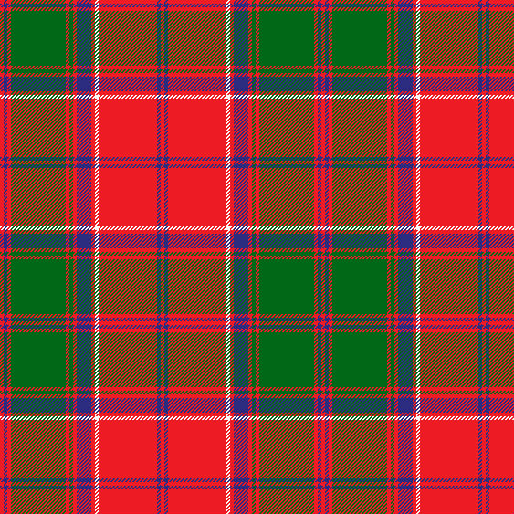 R/4 B4 R4 G60 R4 G4 R4 B16 R4 W4 R64 B4 R/4